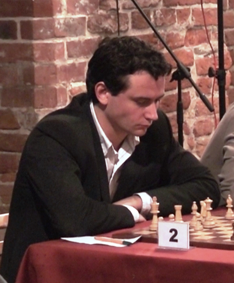 Jeff Sarwer Turniej o Puchar Zamku Malborskiego 09.07(2)